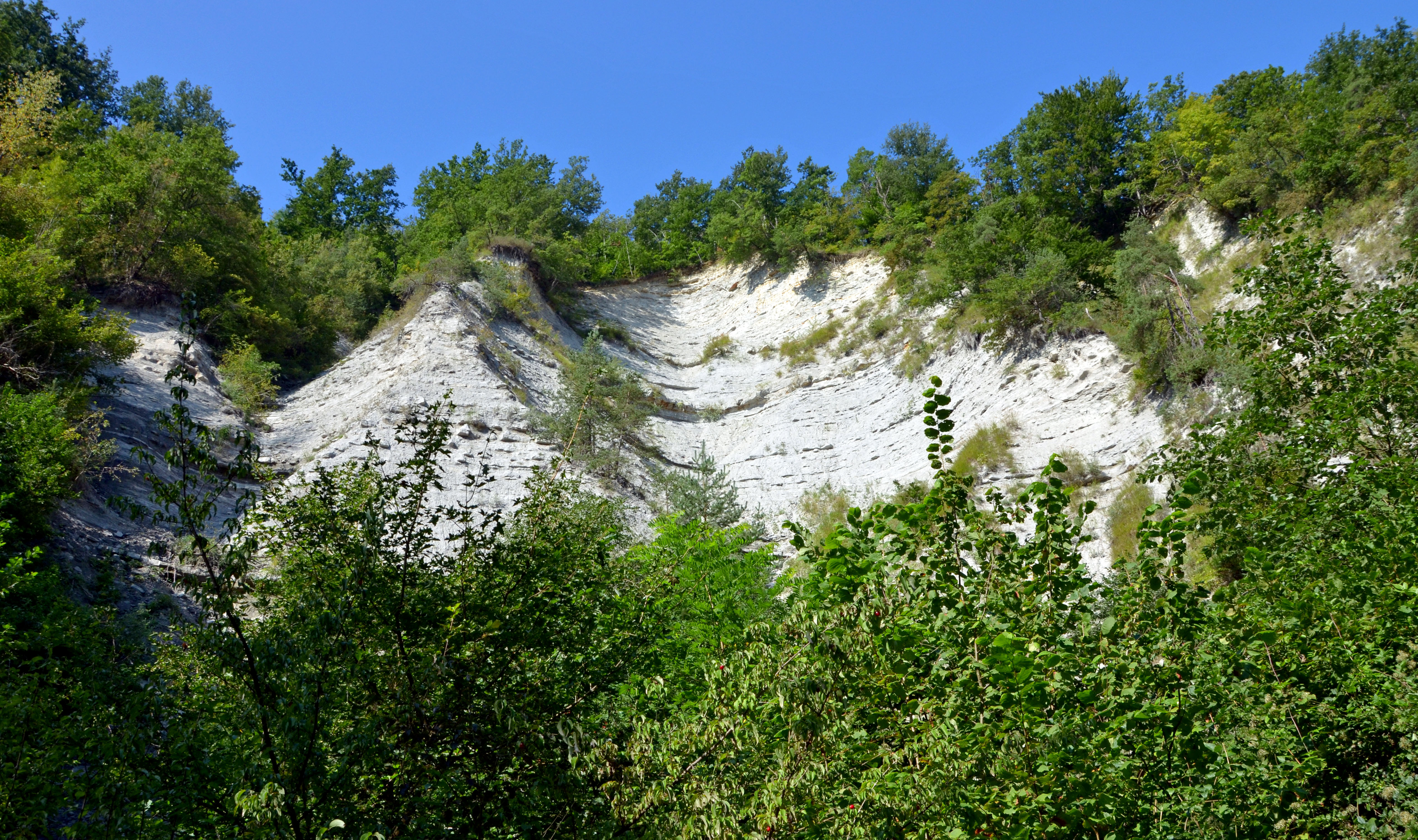 . Calanchi di un torrente delle Langhe